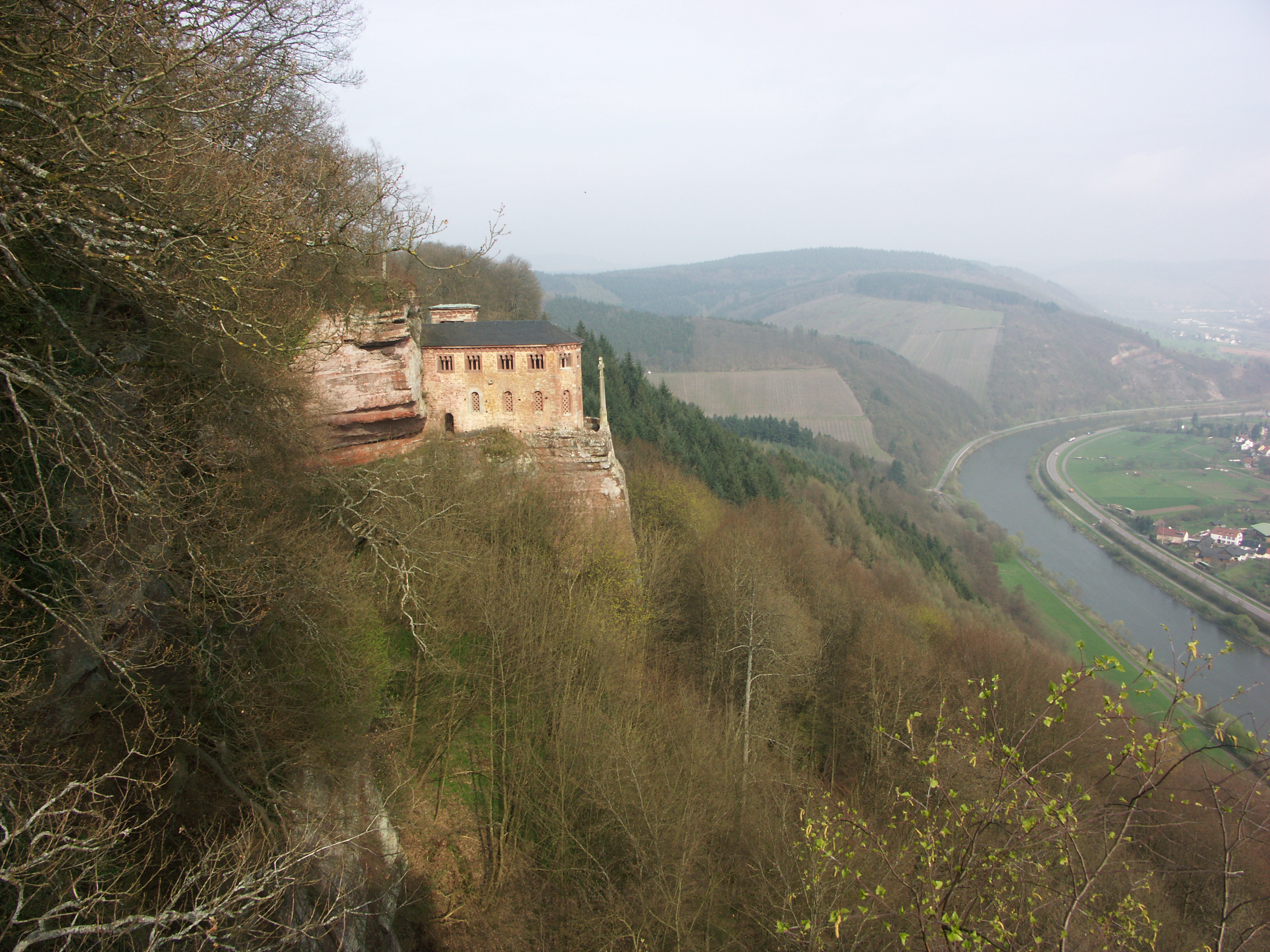 Grabkapelle Johann von Luxemburg, König von Böhmen („der Blinde“ genannt) an der Saar, Kastel-Staadt bei Saarburg, Rheinland-Pfalz, Deutschland.